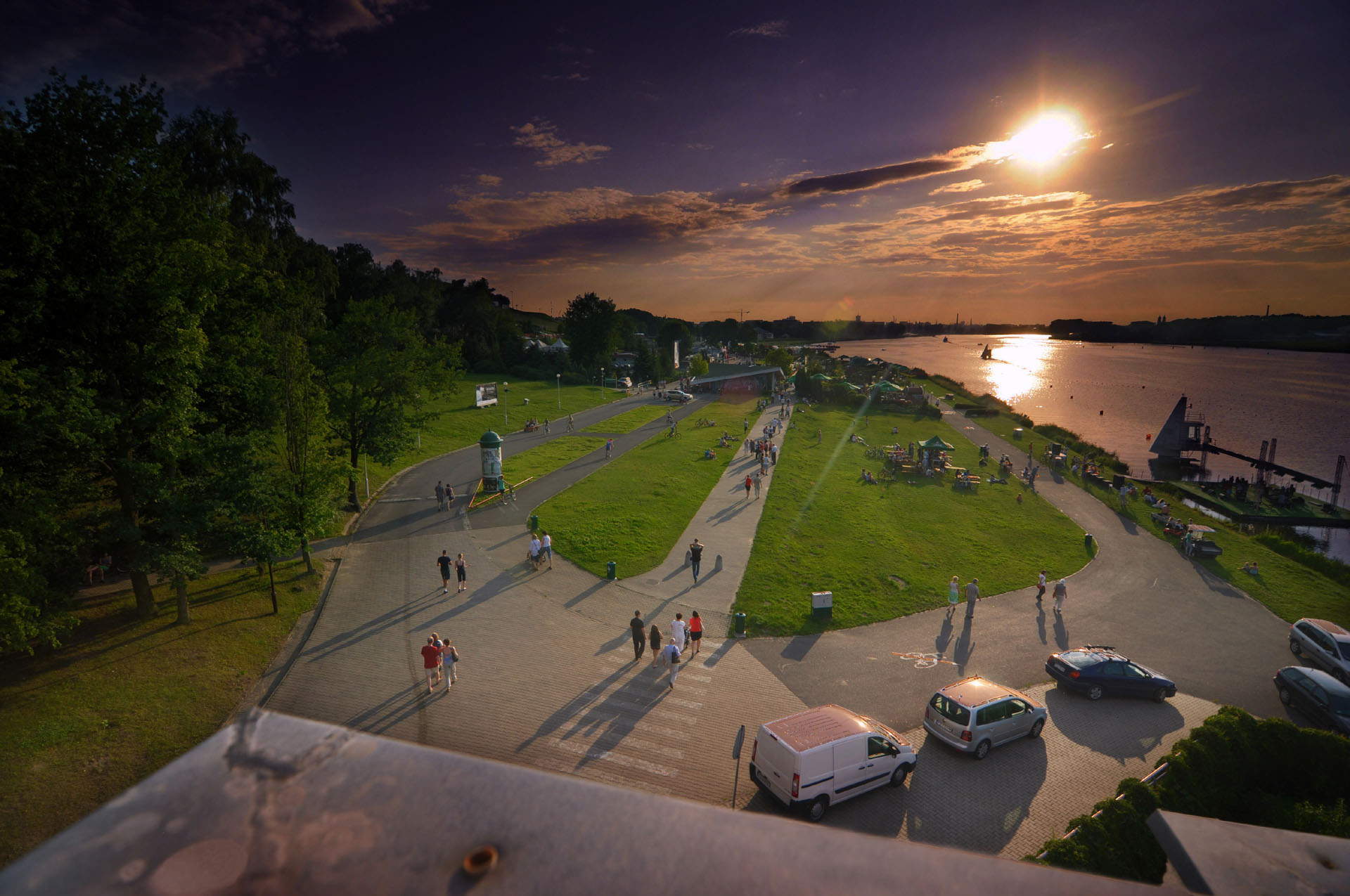 Malta - Poznań